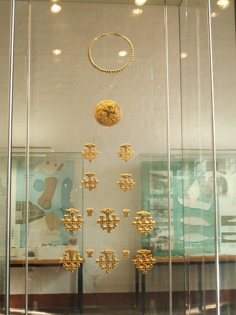 Das Foto zeigt Exponate im Kulturhistorischen Mseum in Stralsund in Stralsund im März 2007.